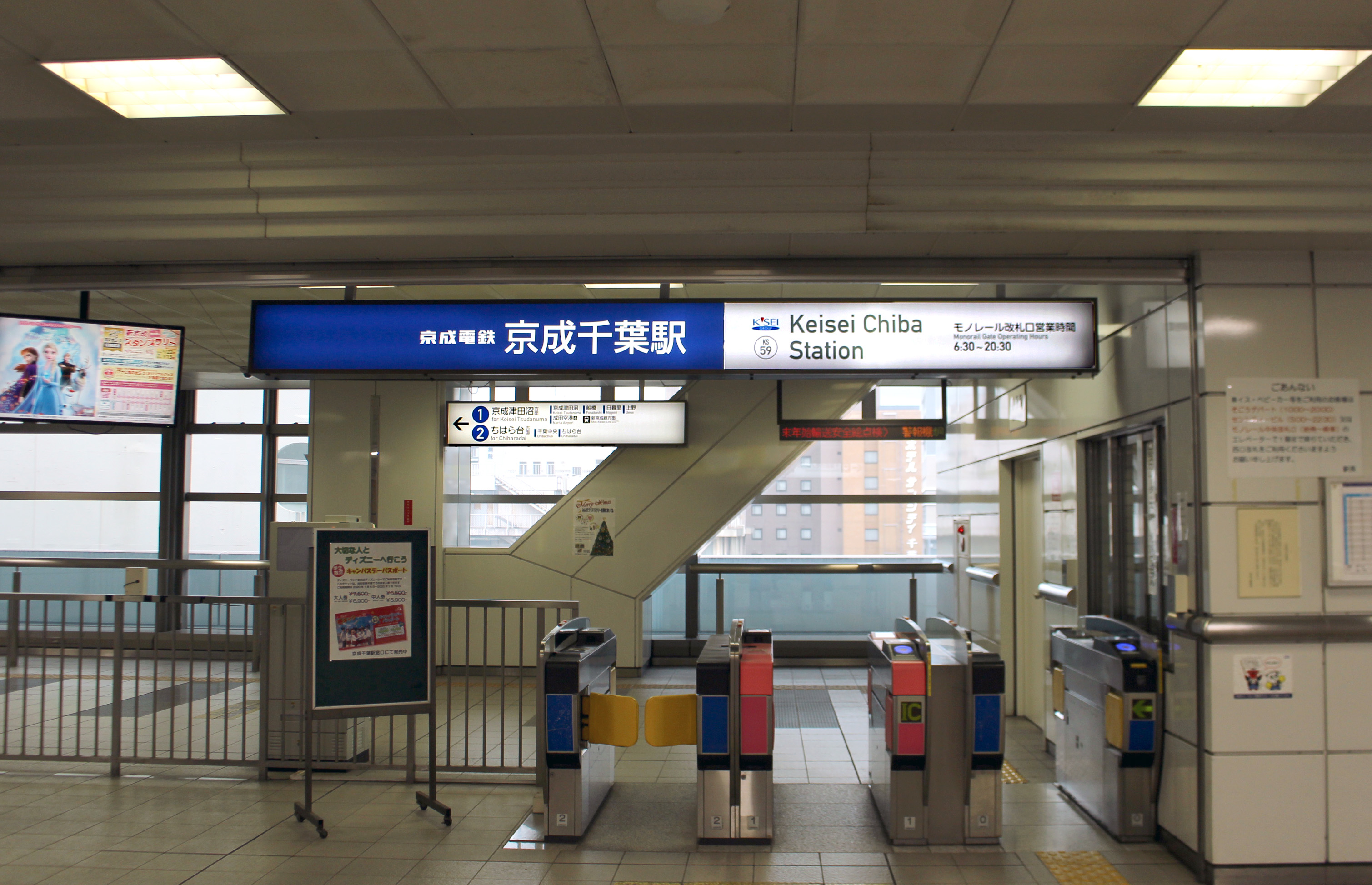 千葉都市モノレール 千葉駅構内にある京成千葉駅モノレール口